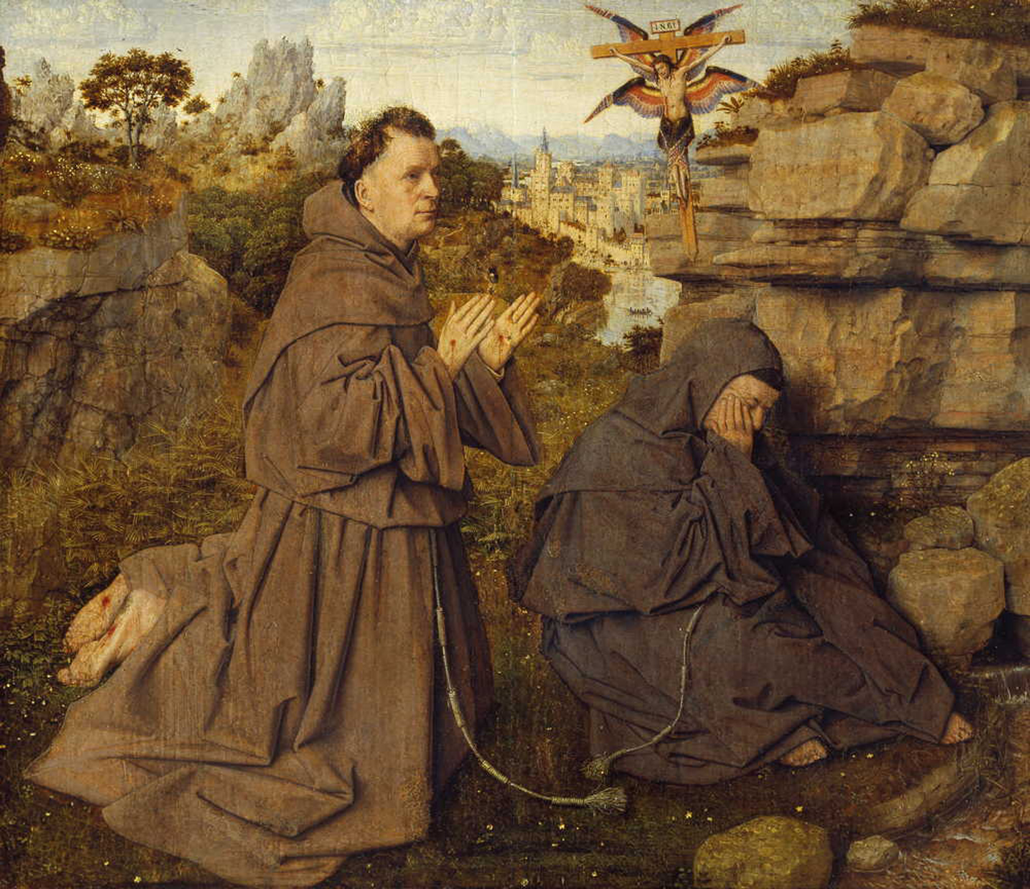 Stimmate di San Francesco (Torino)